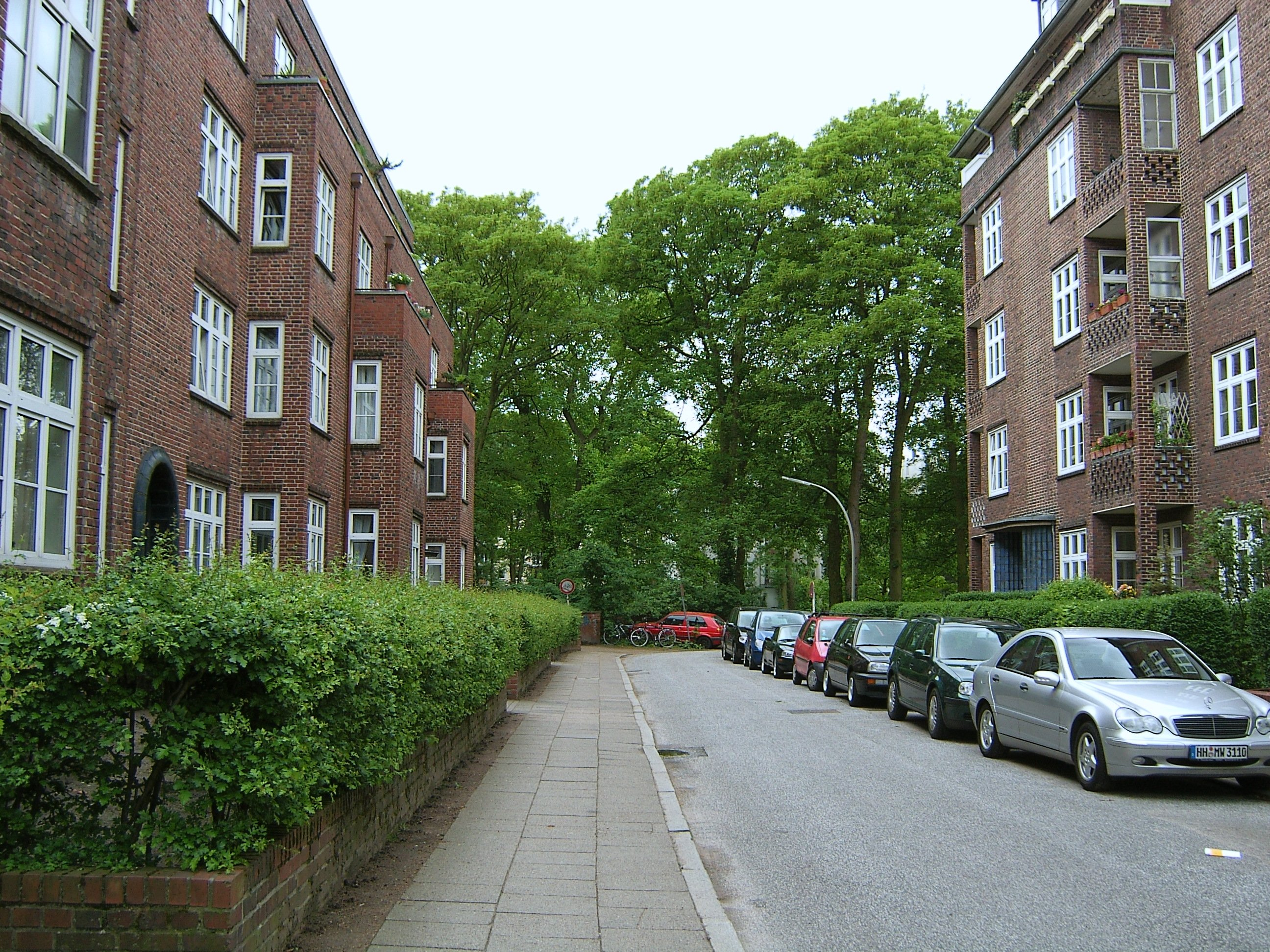 Die Backsteinbauten in der Gustav-Leo-Straße in Eppendorf wurden zwischen 1926 und 1928 nach Entwürfen von Hans und Oskar Gerson erbaut.